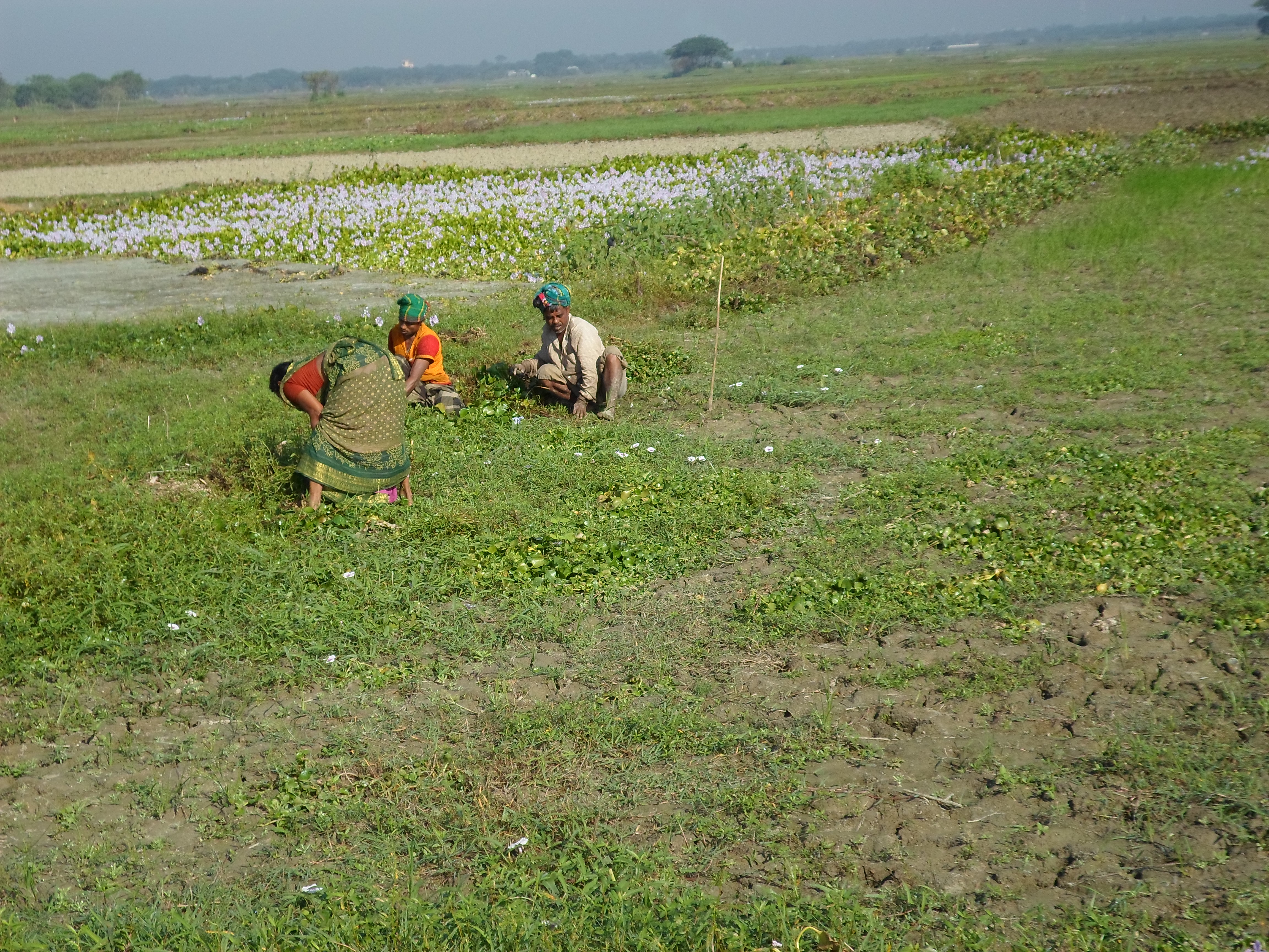 Sirajdikhan Upazila, Bangladesh